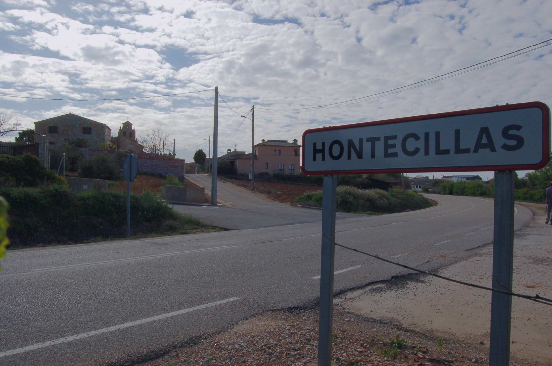 Vista de Hontecillas desde a estrada CM-2100